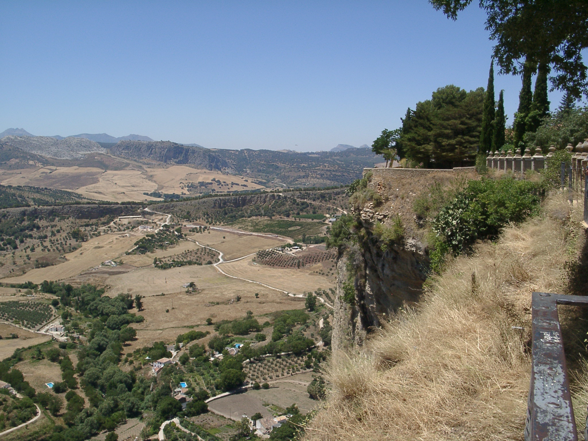 Ronda